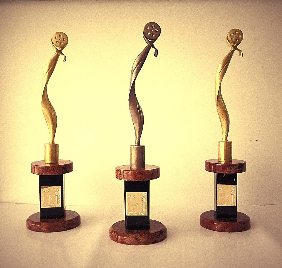 La estatuilla fue diseñada y creada por el Escultor Mexicano Martin Camilo Enríquez Loza. Para uso exclusivo del FESTIVAL INTERNACIONAL DE CINE DEL CENTRO HISTÓRICO DE TOLUCA (FICCHT)